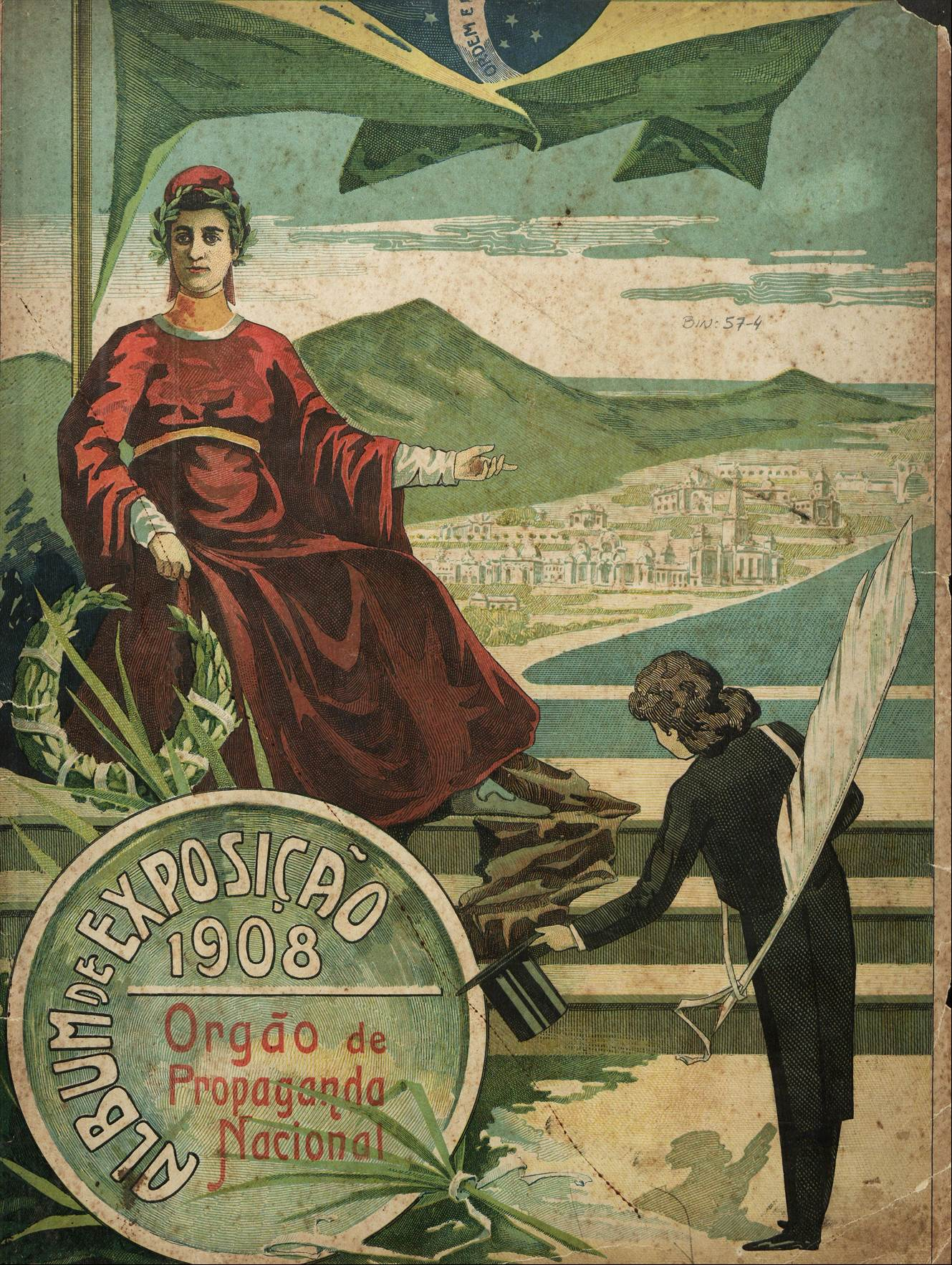 Capa do Álbum de Exposição de 1908 sobre a Exposição Nacional Comemorativa do 1º Centenário da Abertura dos Portos do Brasil.